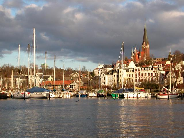 Flensburg, Ostufer